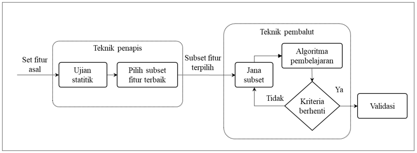 Pemilihan Fitur Hibrid